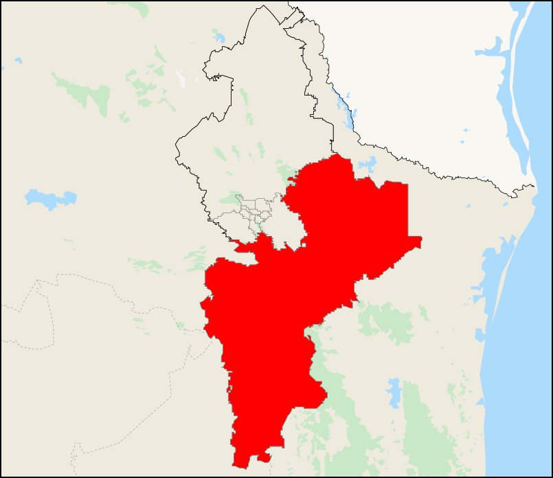 Mapa del distrito electoral federal 9 ubicado en Nuevo León